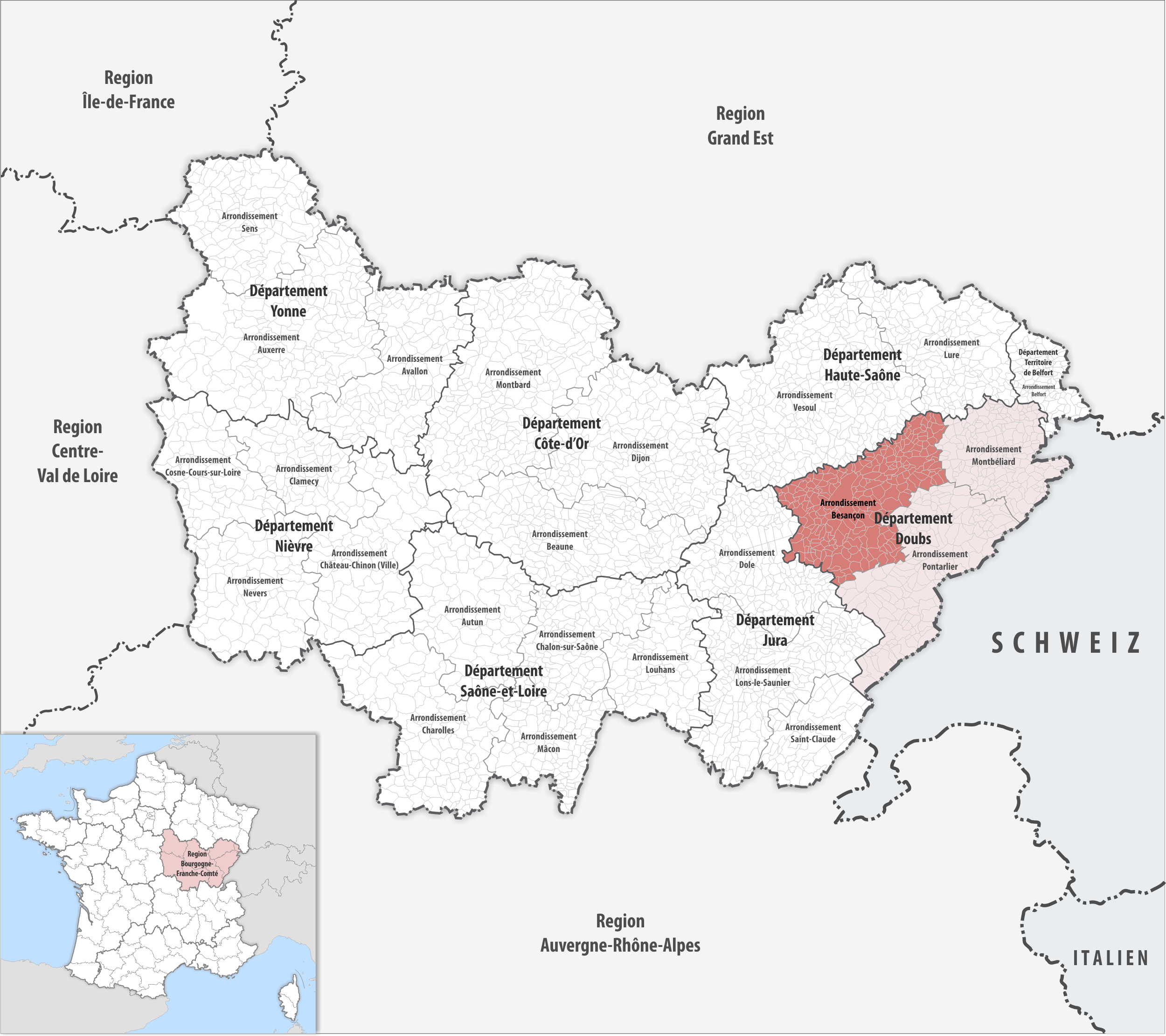 Lage des Arrondissements Besançon